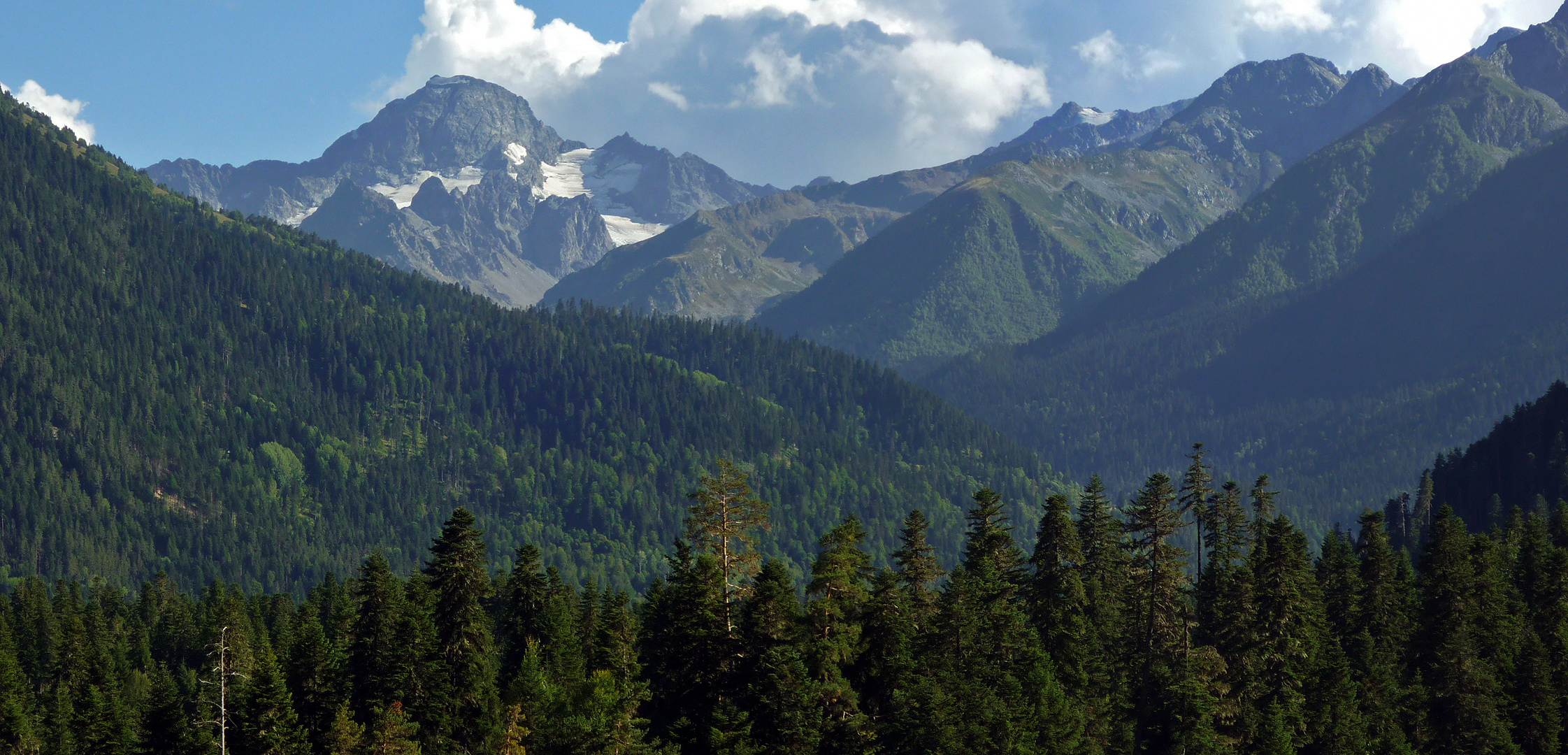 Гора София (3637 м) - красивейшая гора в окрестностях Архыза